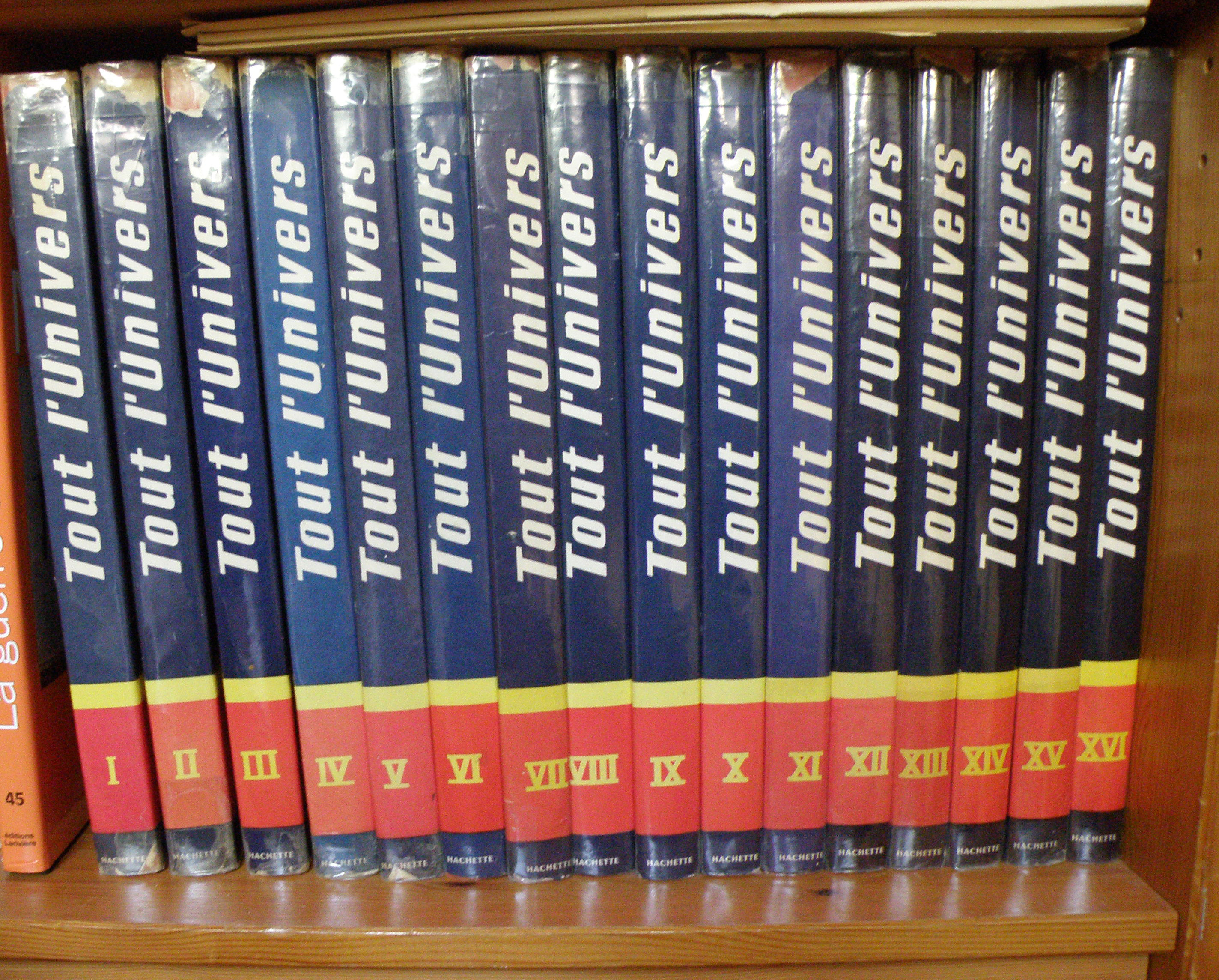 Seize volumes de l'encyclopédie "Tout l'Univers" (série rouge) éditée par Hachette.